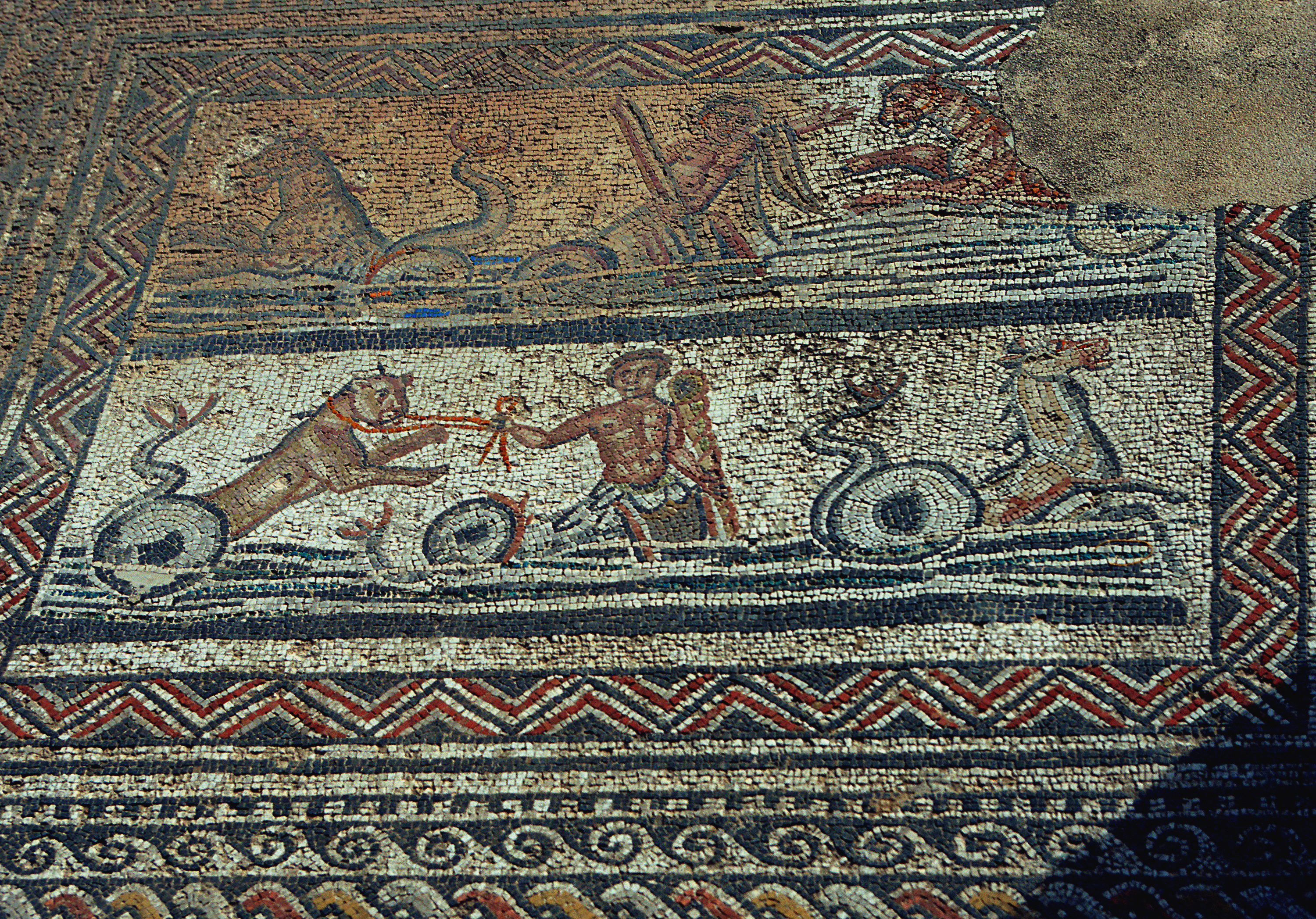 Volubilis, Morocco